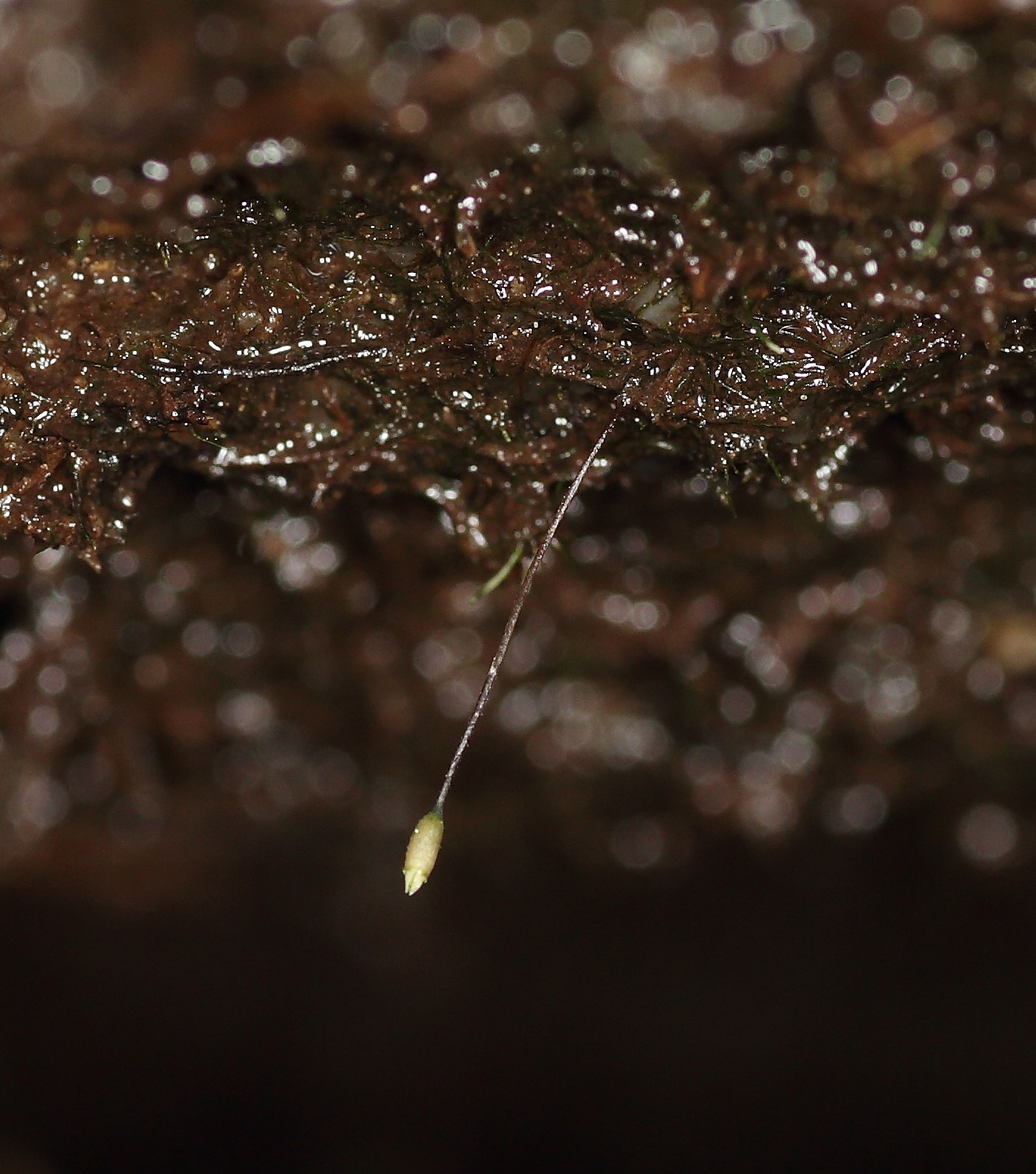 Tetrodontium brownianum